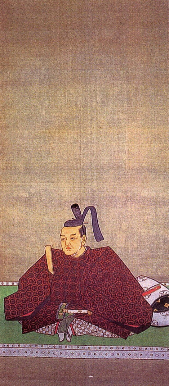 秋田盛季の肖像。